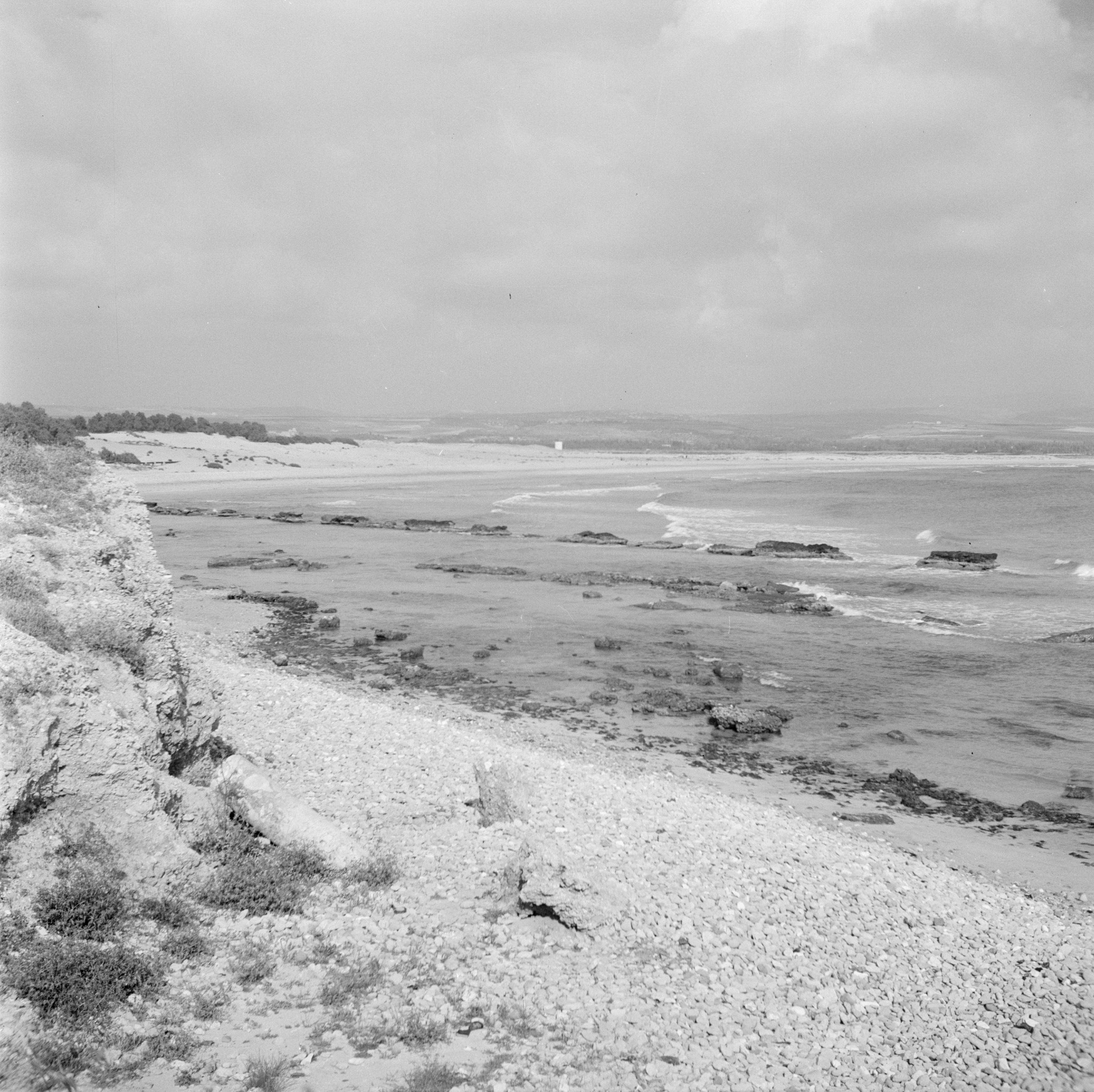 Collectie / Archief : Fotocollectie Van de Poll Reportage / Serie : Midden-Oosten 1950-1955: Libanon Beschrijving : Het strand en de Middellandse Zee nabij Tyrus Datum : 1950 Locatie : Libanon, Tyrus Trefwoorden : stranden, zeeën Fotograaf : Poll, Willem van de Auteursrechthebbende : Nationaal Archief Materiaalsoort : Negatief (zwart/wit) Nummer archiefinventaris : bekijk toegang 2.24.14.02 Bestanddeelnummer : 255-6311